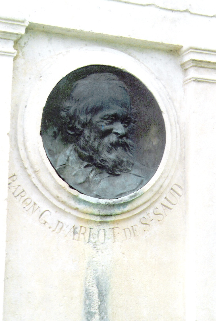 Template:Baron de Saint-Saud sur le monument d'Echourgnac